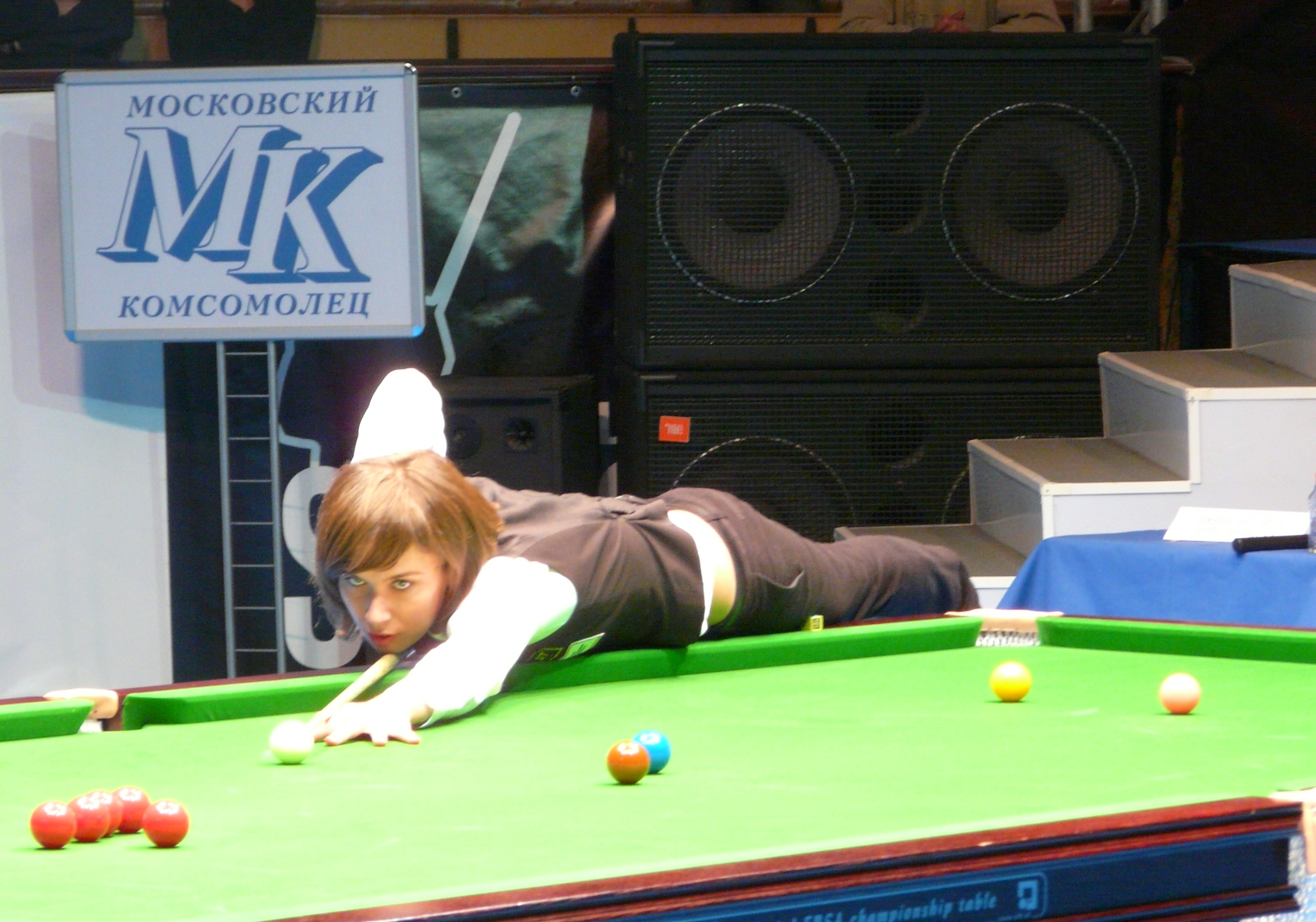 Туринир World Series of Snooker в Москве